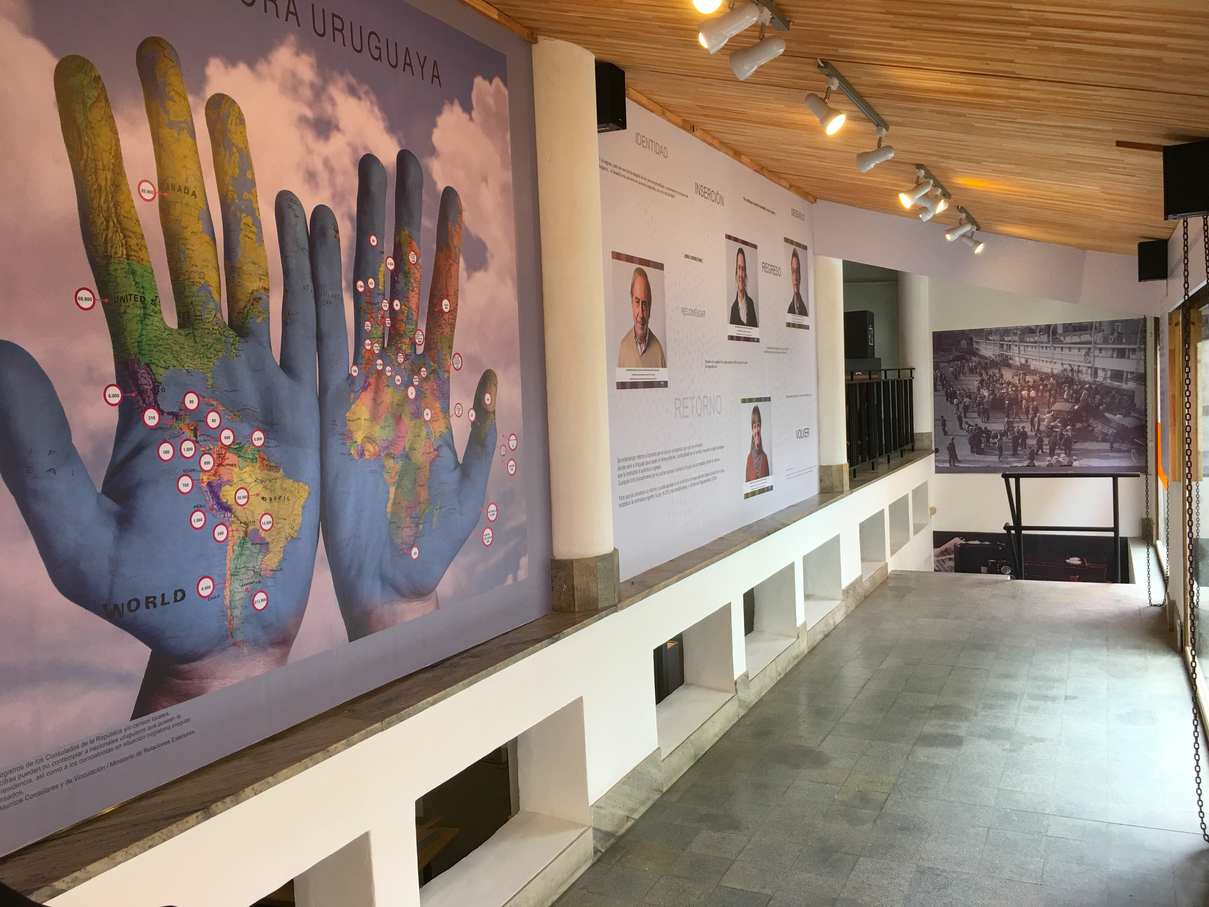 "Pasado y Presente de la Migración en Uruguay"